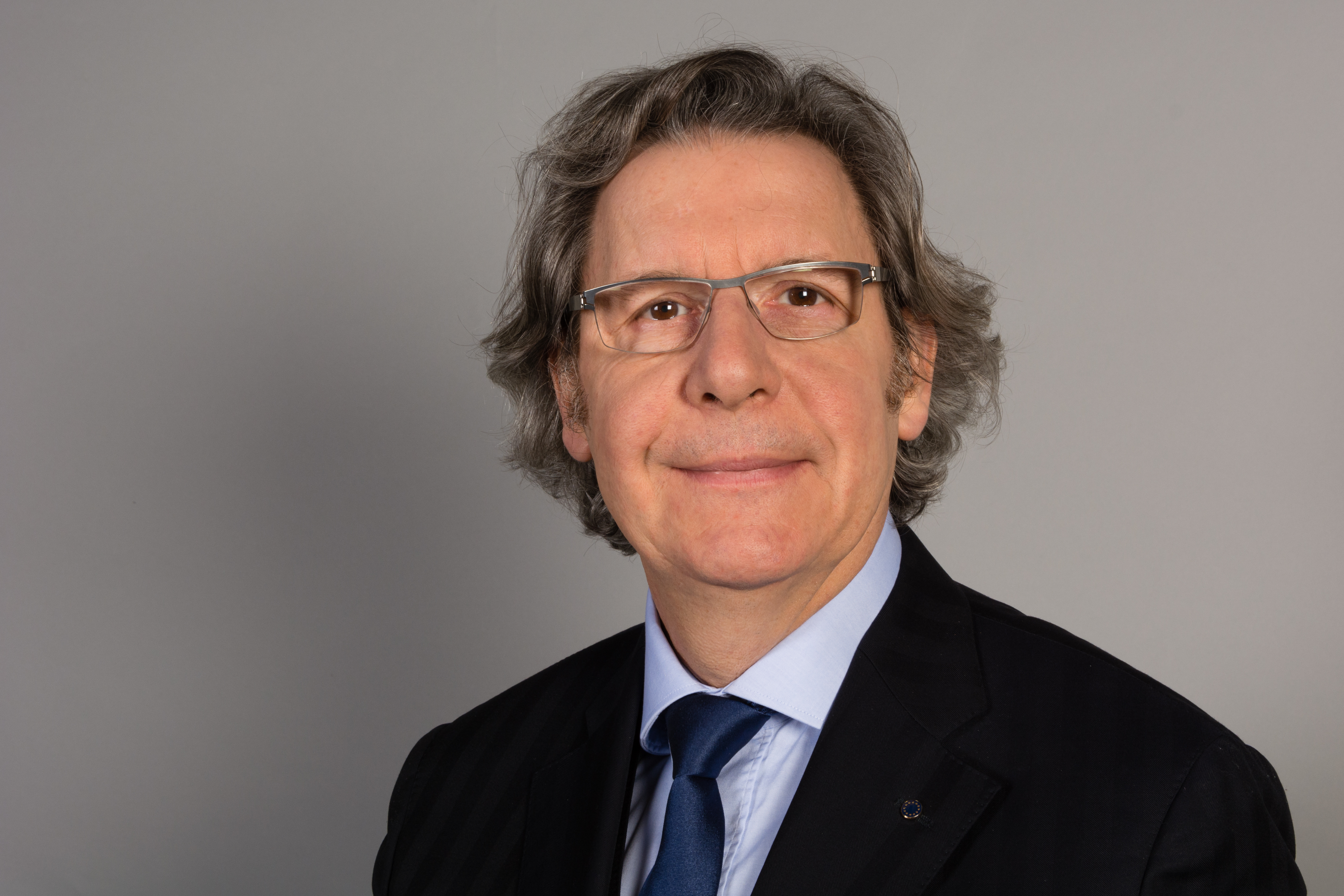 Gilles Pargneaux, Frankreich, 2014 Mitglied des Europäischen Parlaments (MEP)